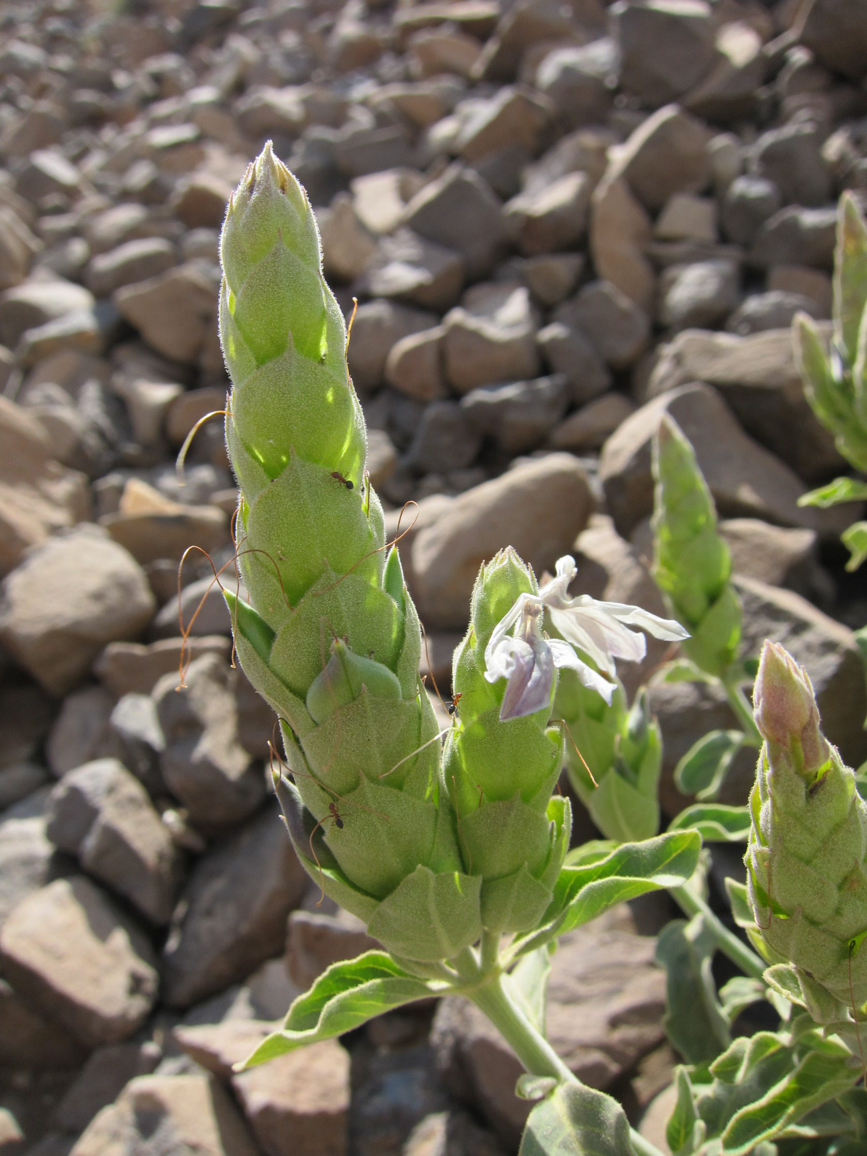 Ecbolium viride (Forssk.) Alston, près d'Ali Sabieh, Djibouti.